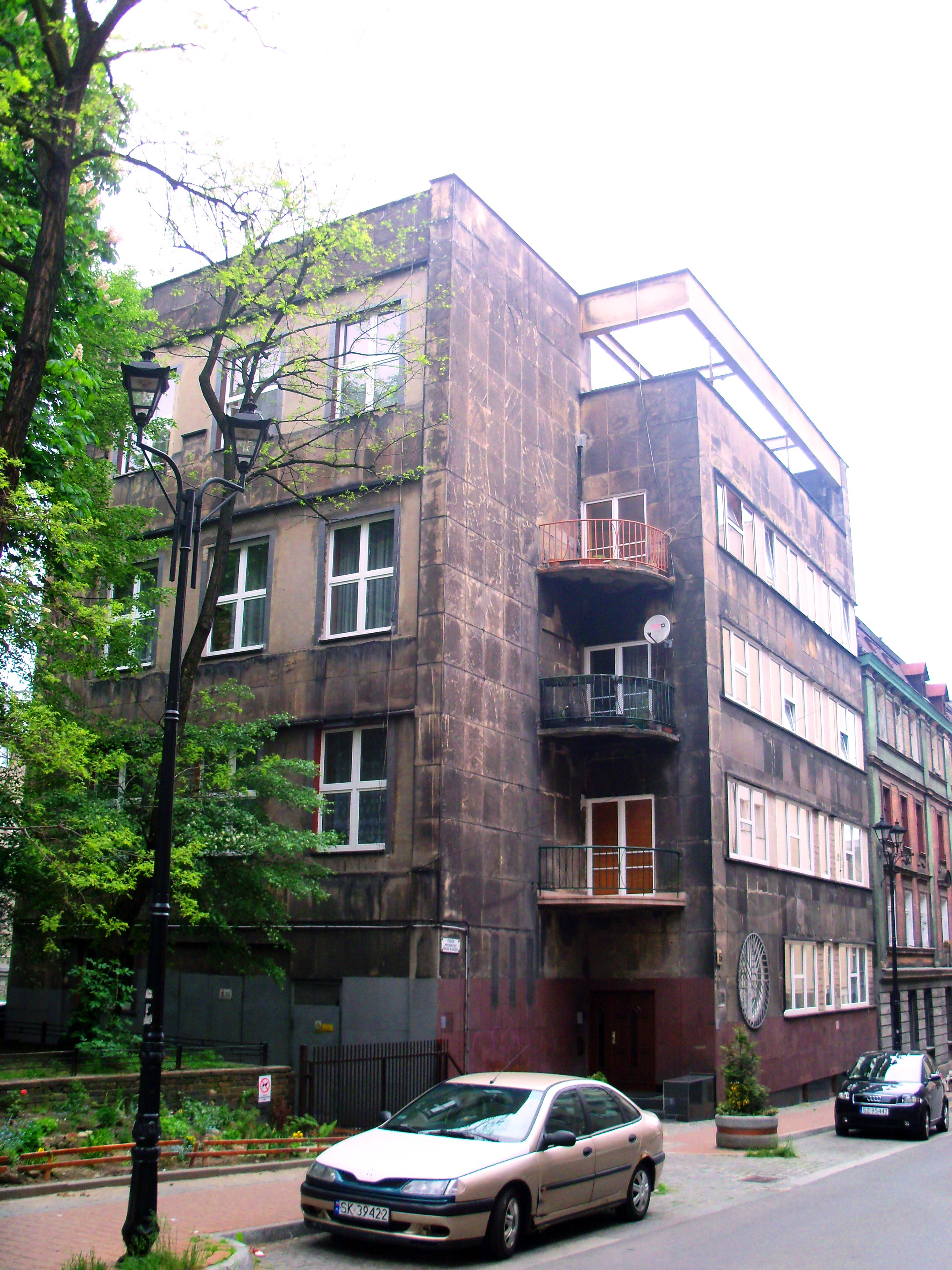 Budynek przy ulicy Stanisława Kobylińskiego 5 w Katowicach − pozostałość skrzydła mieszkalnego dawnego Muzeum Śląskiego; został wpisany do rejestru zabytków 7 lipca 1983 (nr rej.: A/1306/83). Wybudowano go w 1935 roku w stylu funkcjonalizmu według projektu Karola Schayera.